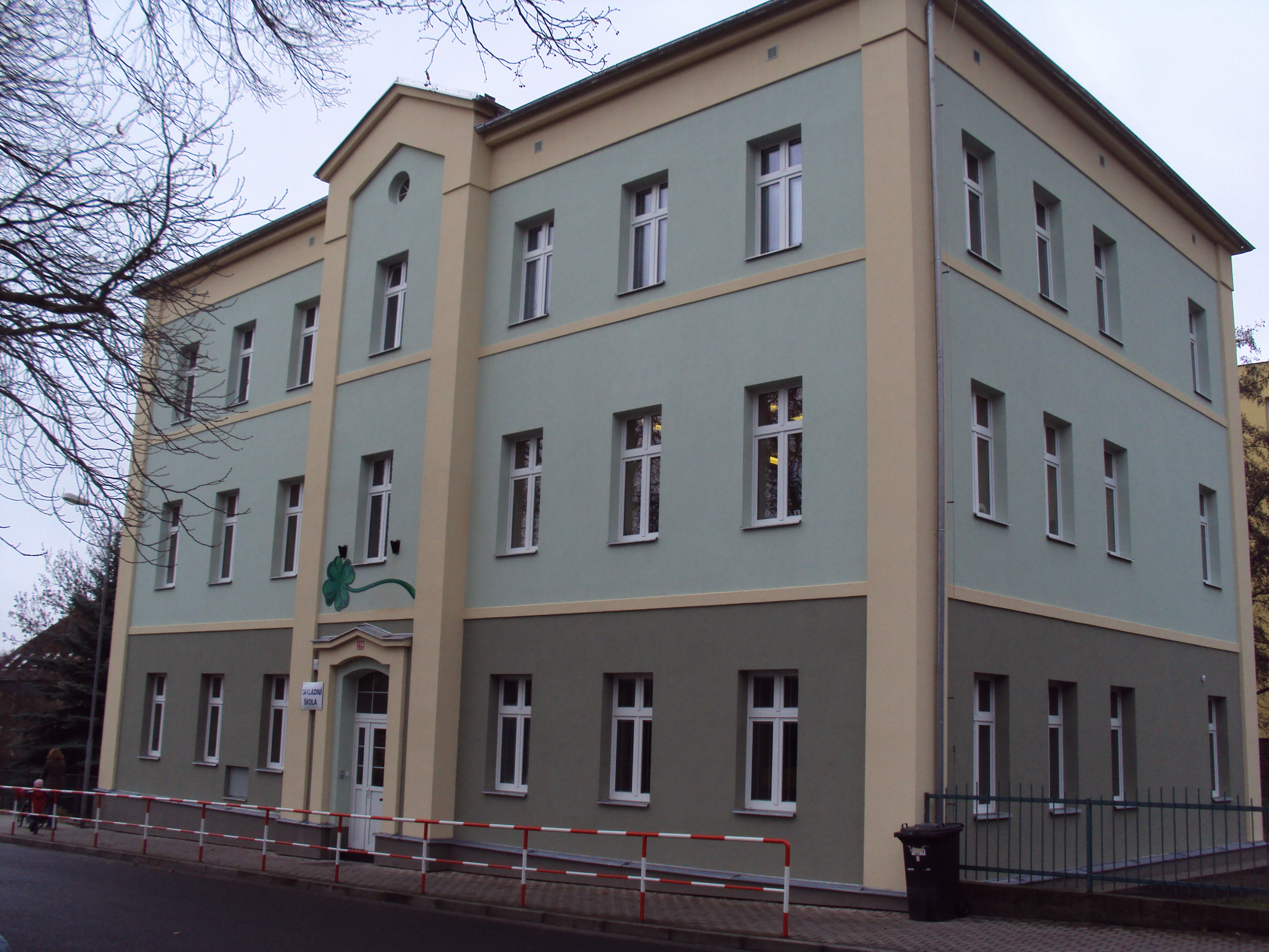 Základní škola v Arnultovicích, čtvrti Nového Boru